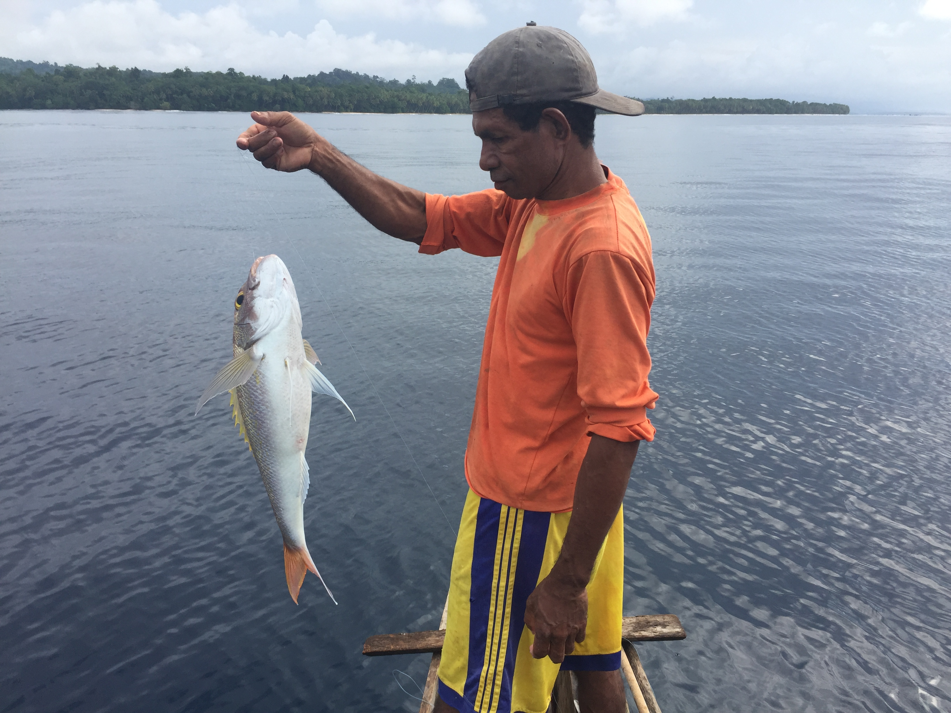 Bapak Simon Berotabui, salah satu nelayan di Kampung Pariem sedang memancing ikan